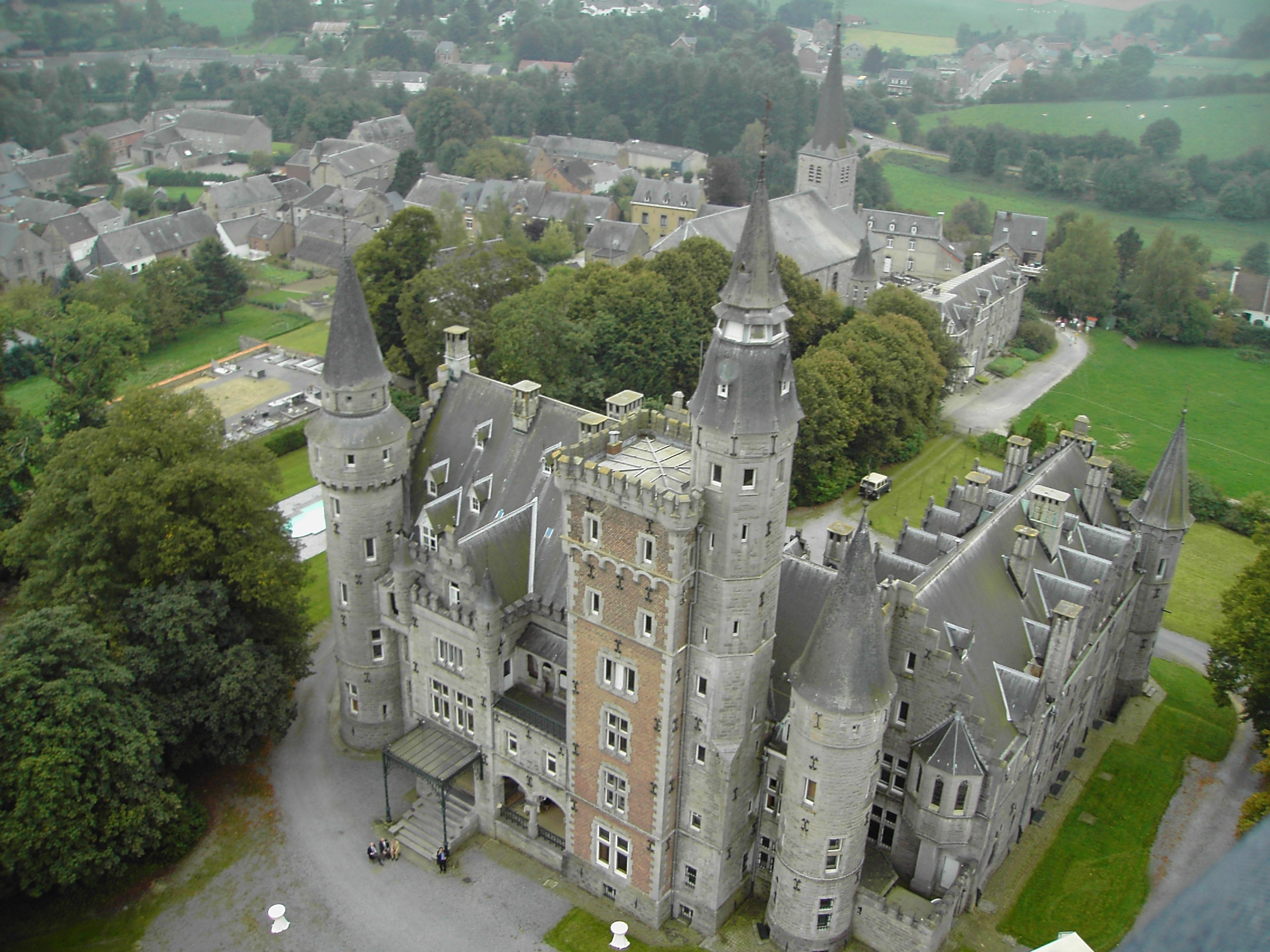 Chateau de Leignon